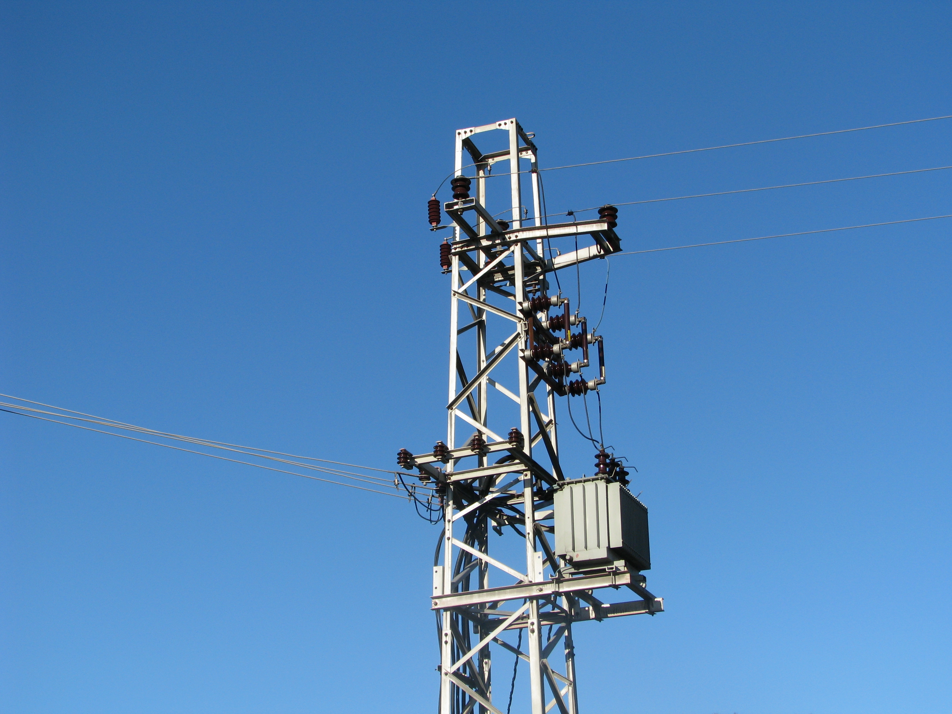 Steber NN z transformatorjem